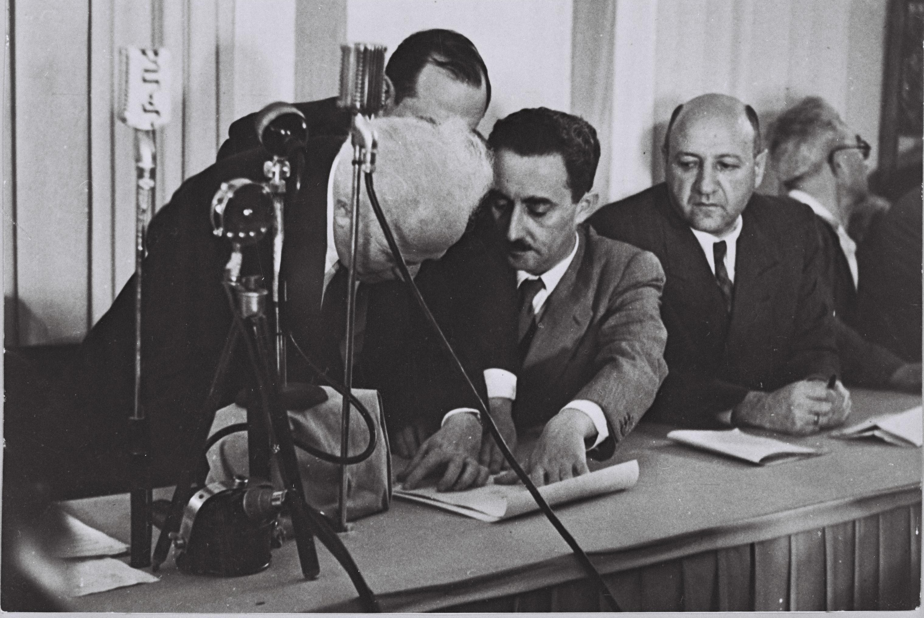 Ben Gurion (Left) Signing the Declaration of Independence held by Moshe Sharet with Eliezer Kaplan looking on at the Tel Aviv museum on Rothschild Blvd. טקס הכרזת יום העצמאות של מדינת ישראל. בצילום, ראש הממשלה דוד בן גוריון חותם על מגילת עצמאות ישראל, במוזיאון תל אביב בשד' רוטשילד. מימין, משה שרת (מחזיק במגילה) ולידו אליעזר קפלן. Photo: PRI OR, 05/14/1948 (לפירסום צילום זה, חובה לבקש את אישור הצלם בכתב).